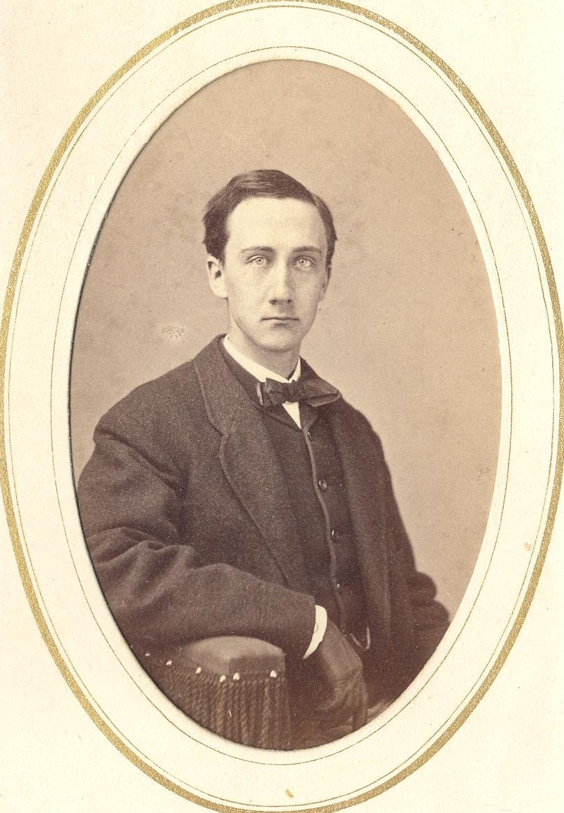 25歳時のウィリアム・インブリー（1870年のプリンストン大学入学ポートレイトより）